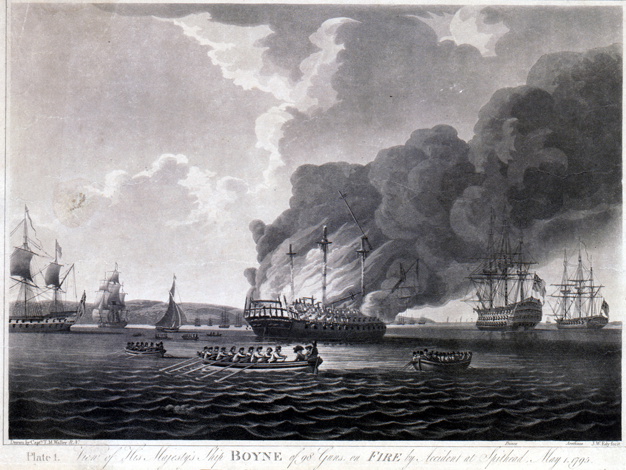 В ночь с 30 апреля на 1 мая 1795 года в Спитхеде на борту HMS Boyne возник пожар. Его не удалось потушить и корабль взорвался.